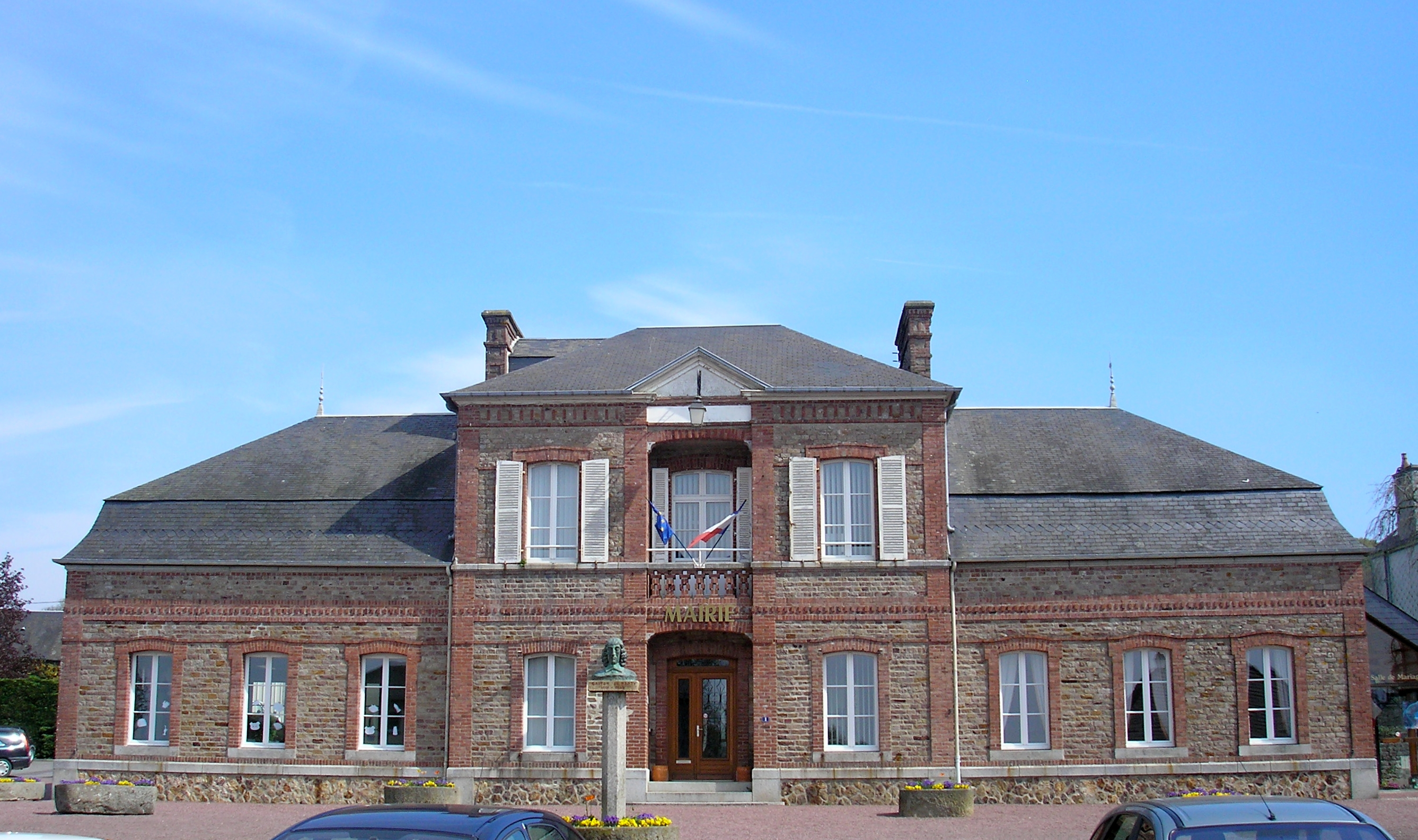 Le Bény-Bocage (Normandie, France). La mairie.